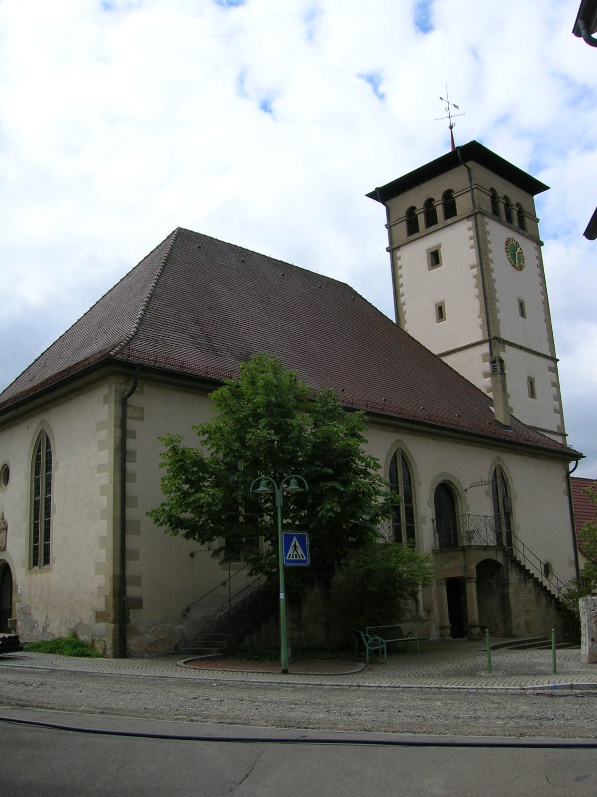 St.Veits Kirche in Kernen-Stetten.